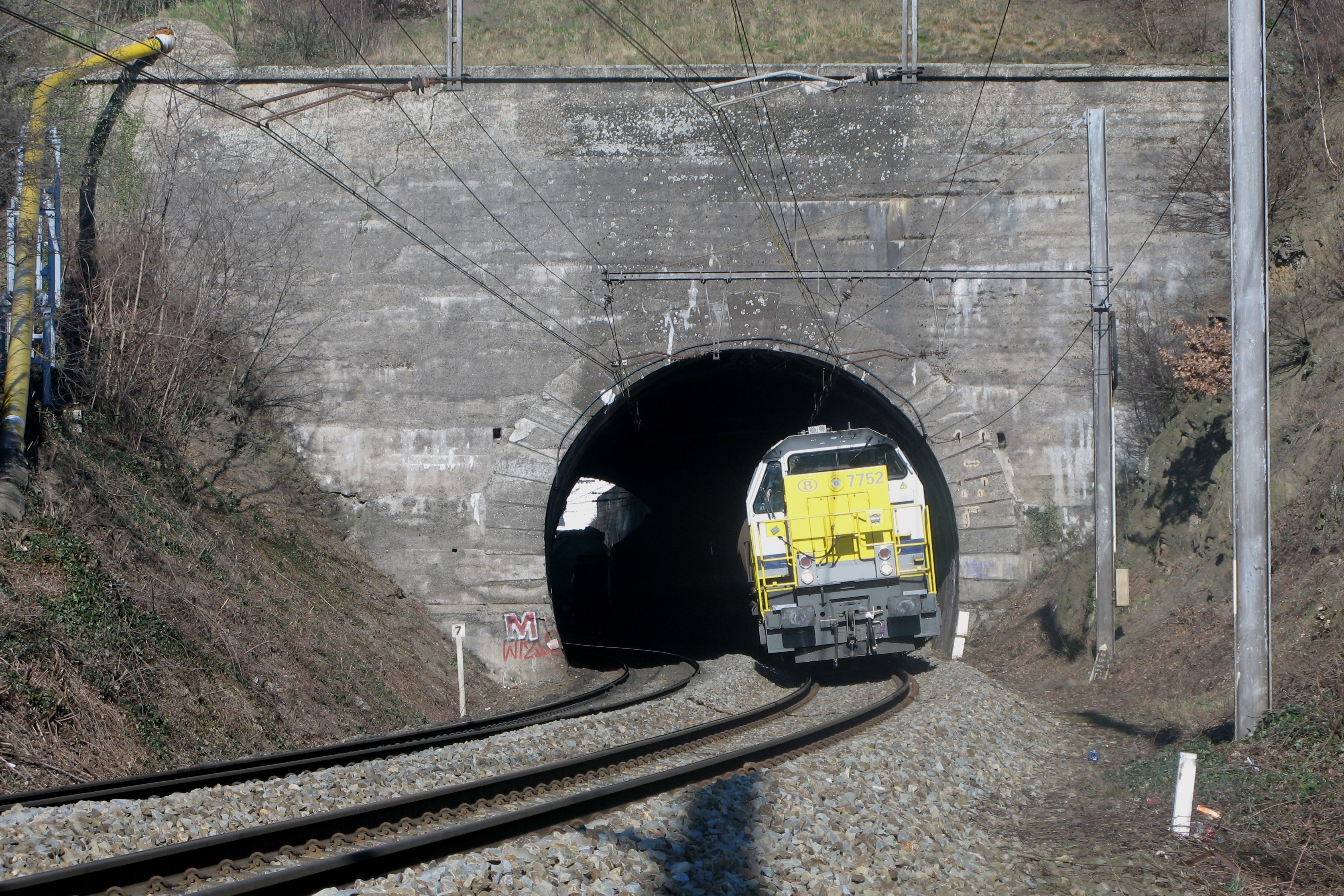 Tunnel vu Froidmont Kapp Léck.